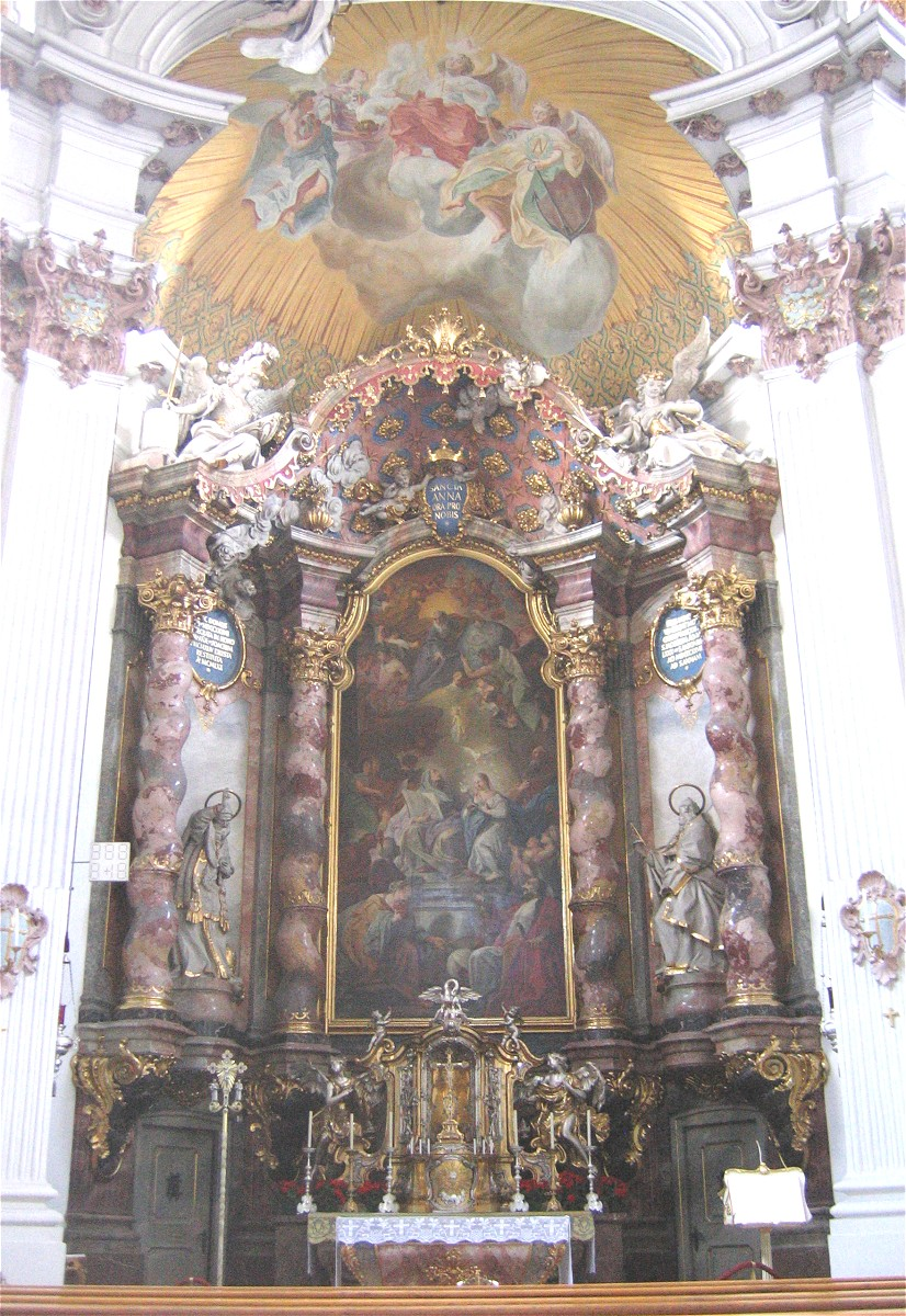 Klosterkirche St Anna in München, Hochaltar